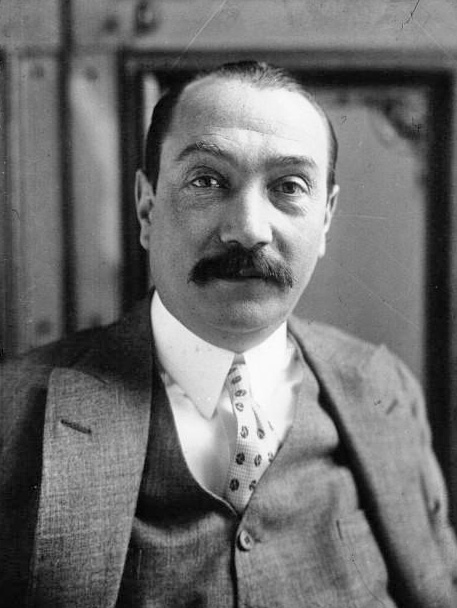 Mr Forgeot, ministre des Travaux Publics (portrait) : photographie de presse